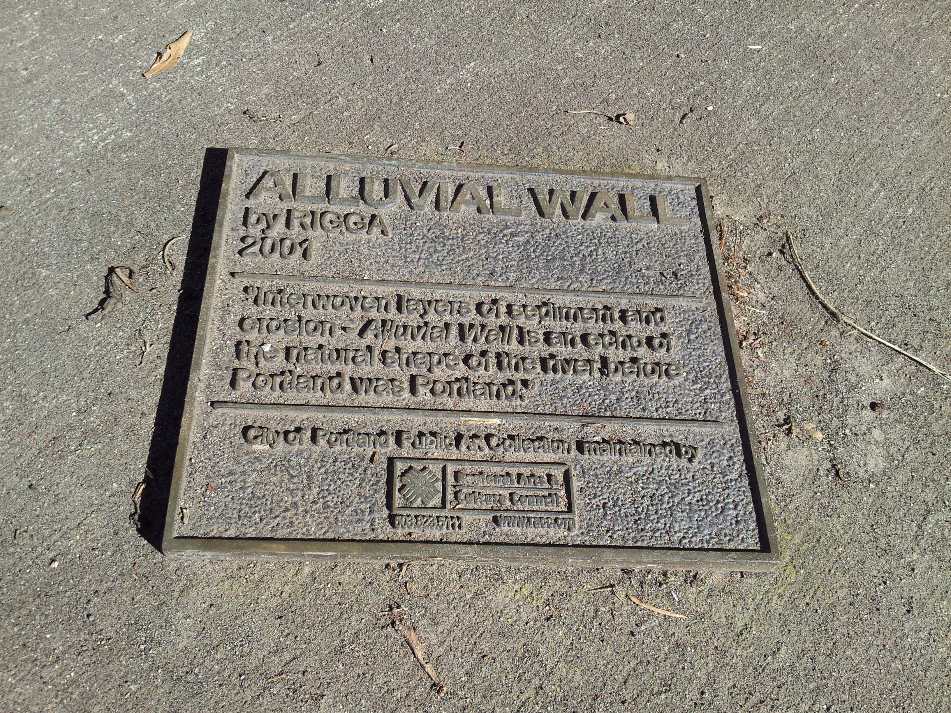 Alluvial Wall plaque, Portland, Oregon (2015)